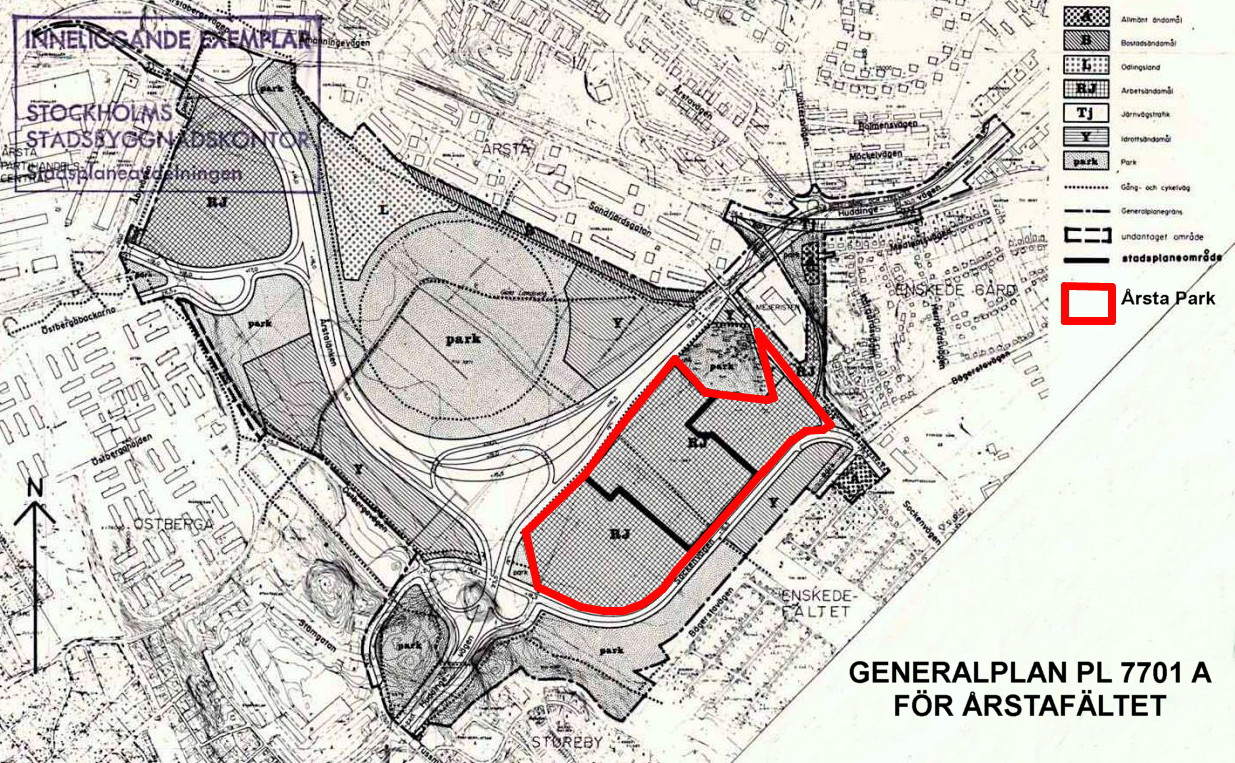 Generalplan för Årstafältet 1977, kompletterad av Holger Ellgaard